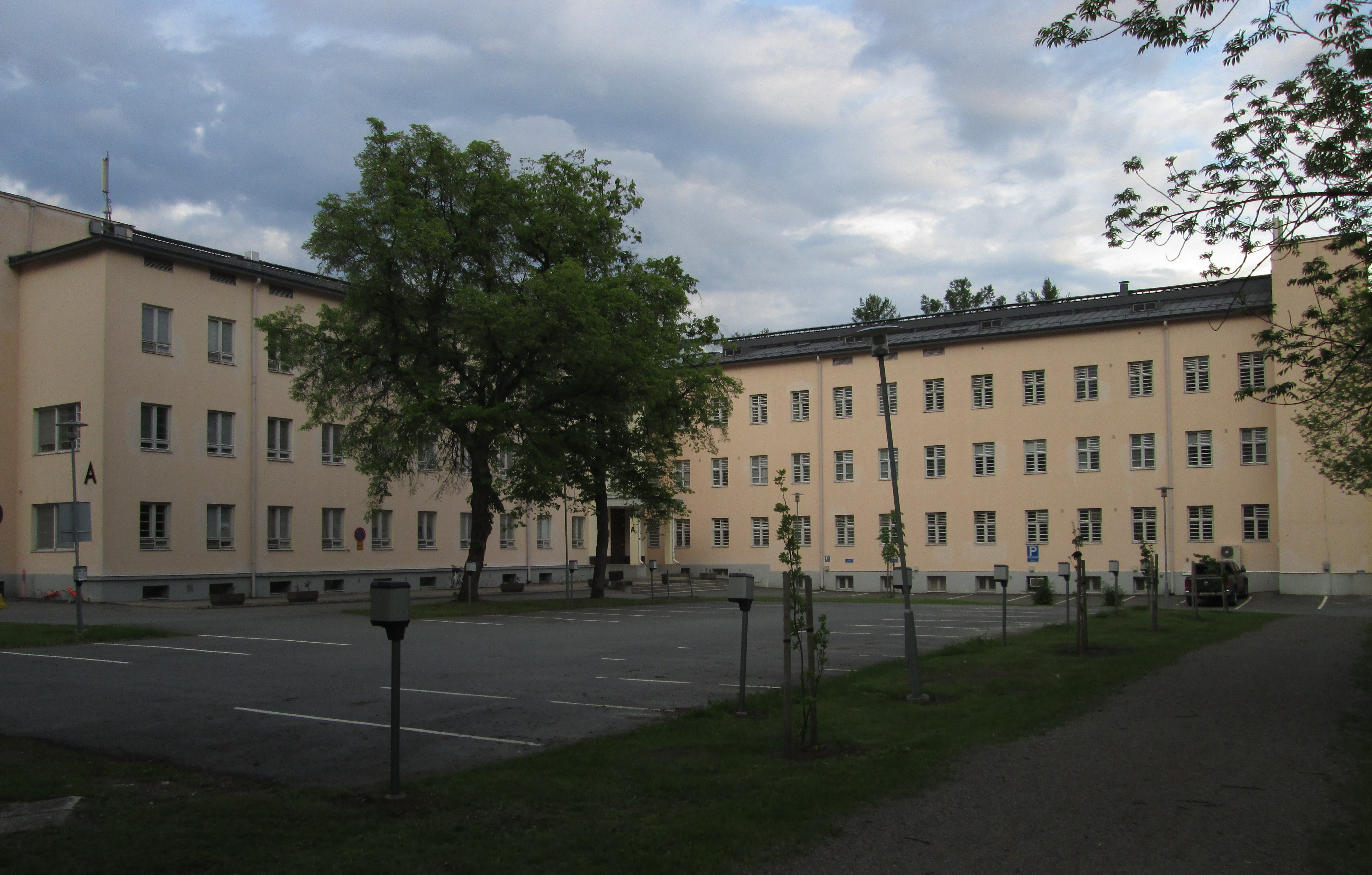 Hattelmalan sairaalan vanhin rakennus Hämeenlinnan Kankaantakana, nykyään Hämeen ammattikorkeakoulun käytössä